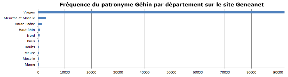 Patronyme Géhin par département - Statistiques de Geneanet